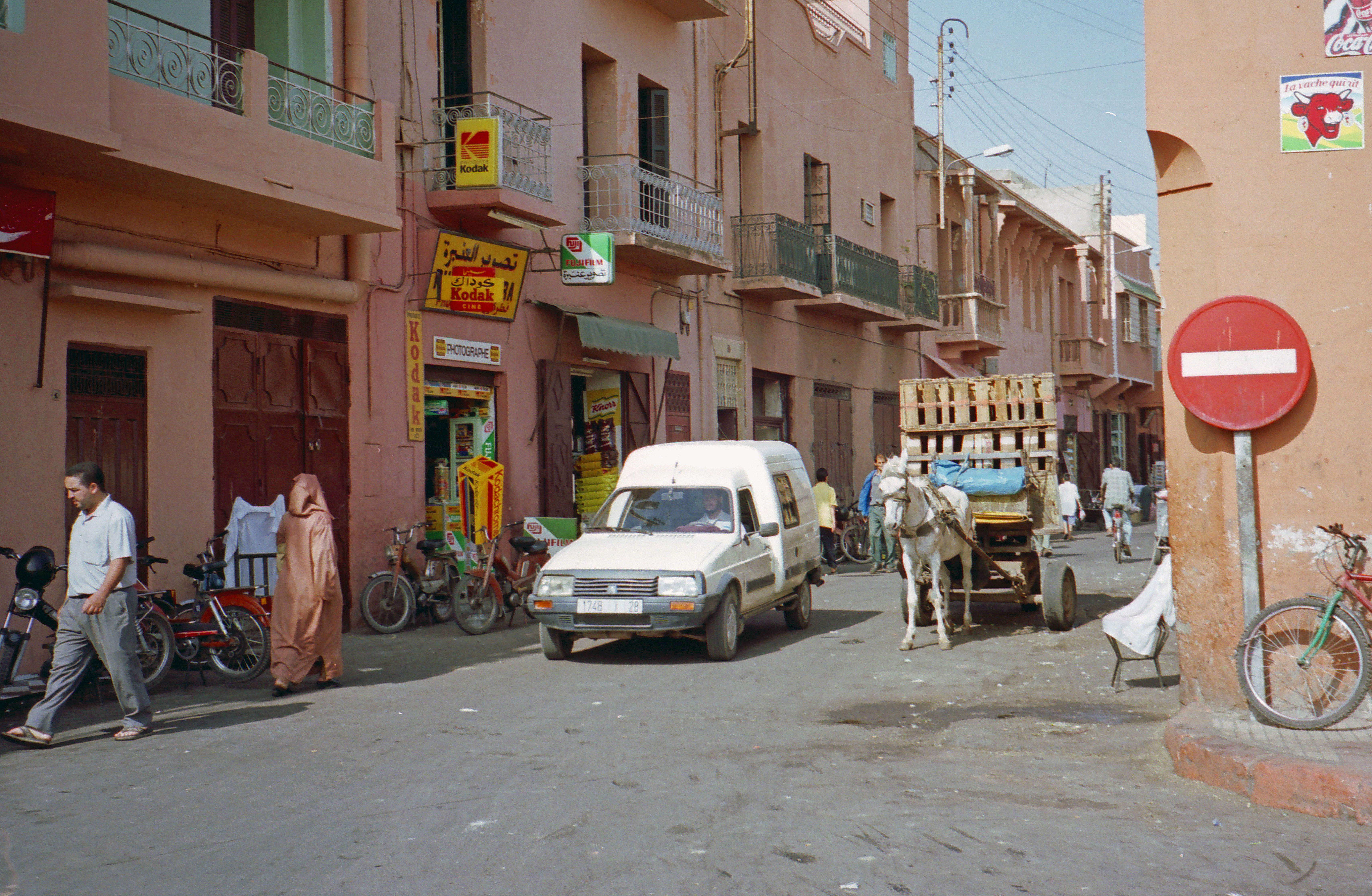 Morocco-64